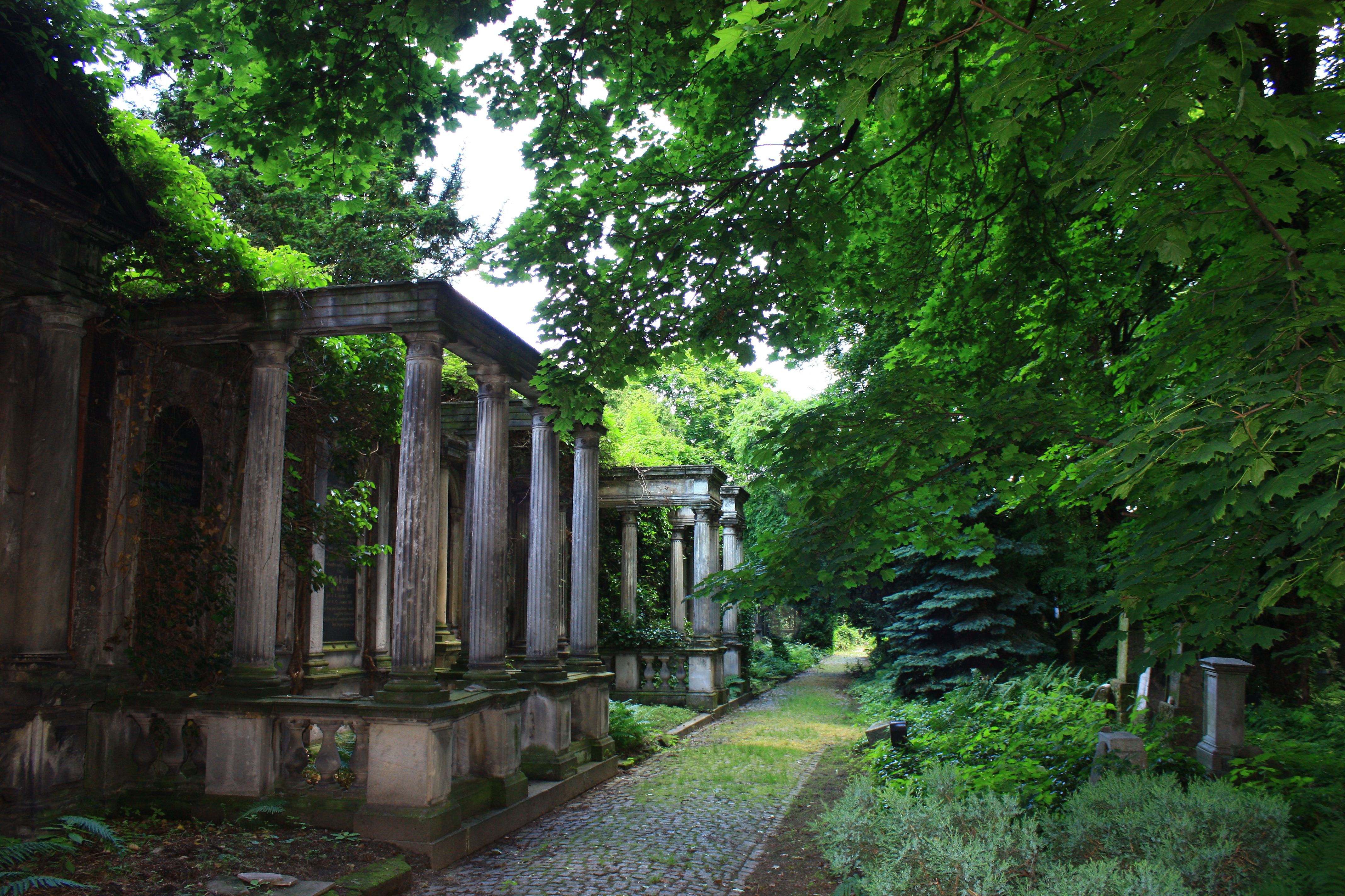 Wrocław, cmentarz żydowski